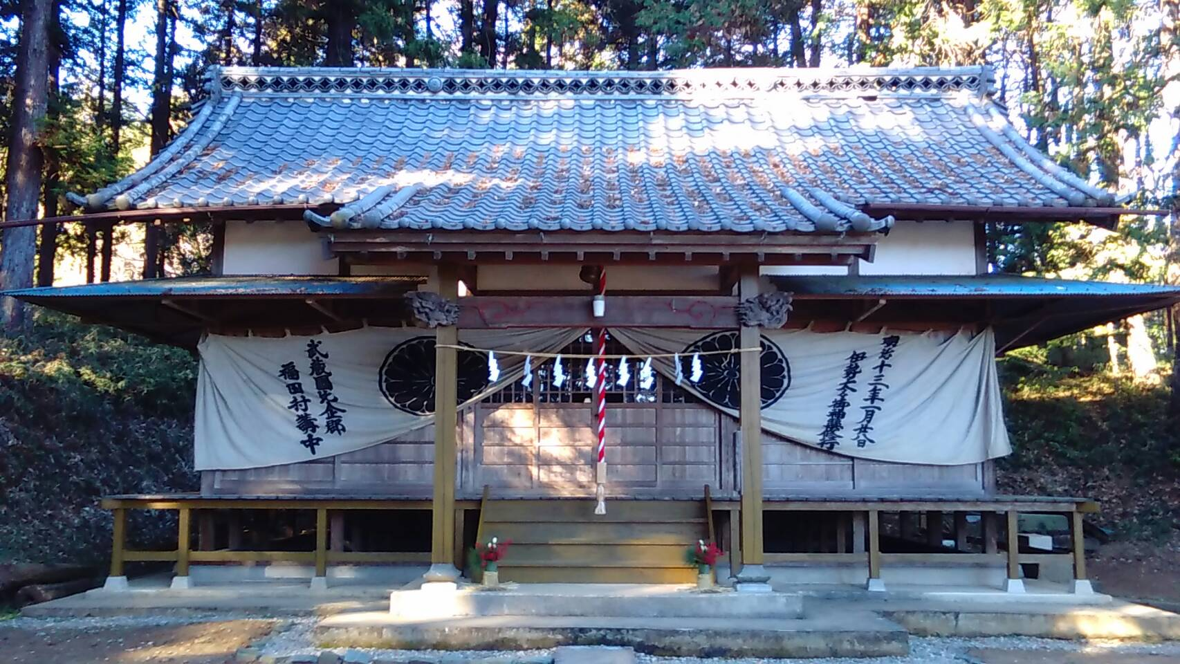 埼玉県比企郡滑川町福田の熊野神社